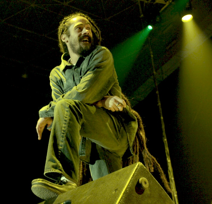 Feliz el , felices nosotros!!